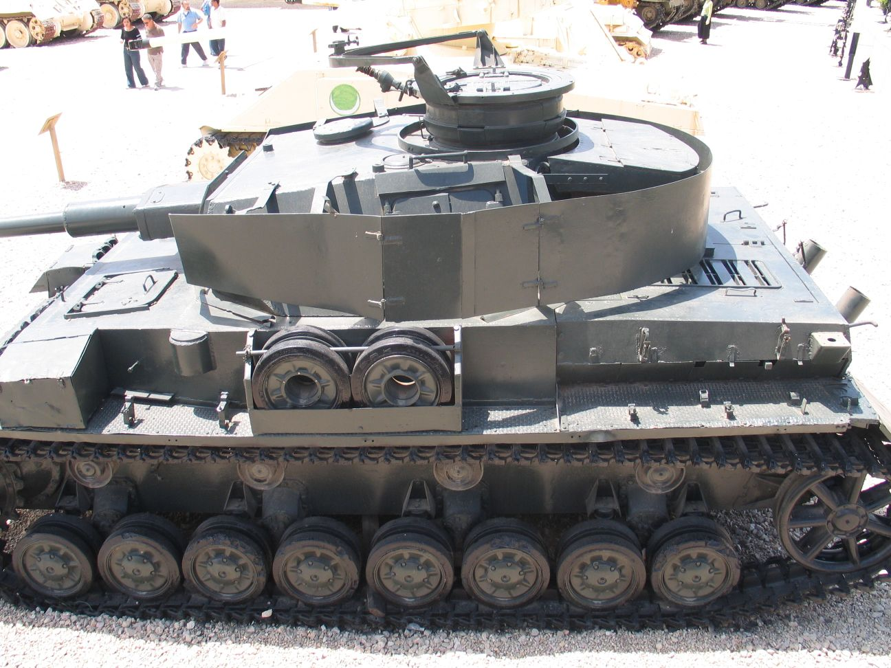 Panzerkampfwagen IV Ausf G in Yad la-Shiryon Museum, Israel.